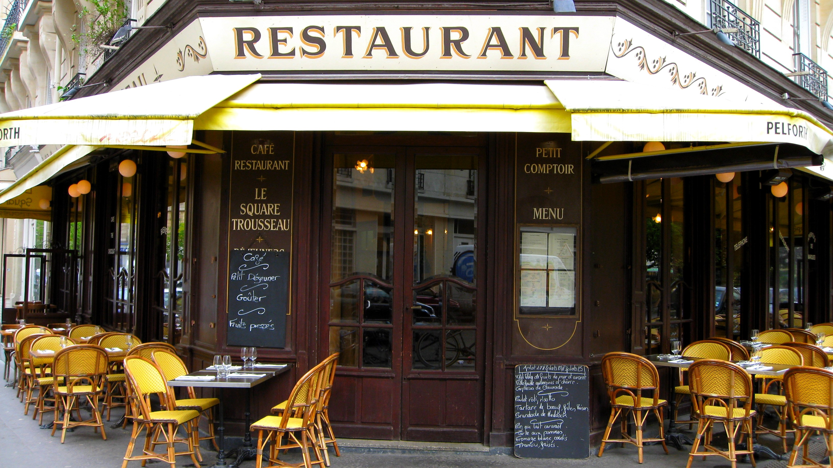 Restaurant Le Square Trousseau, 1 rue Antoine Vollon, 12e Paris